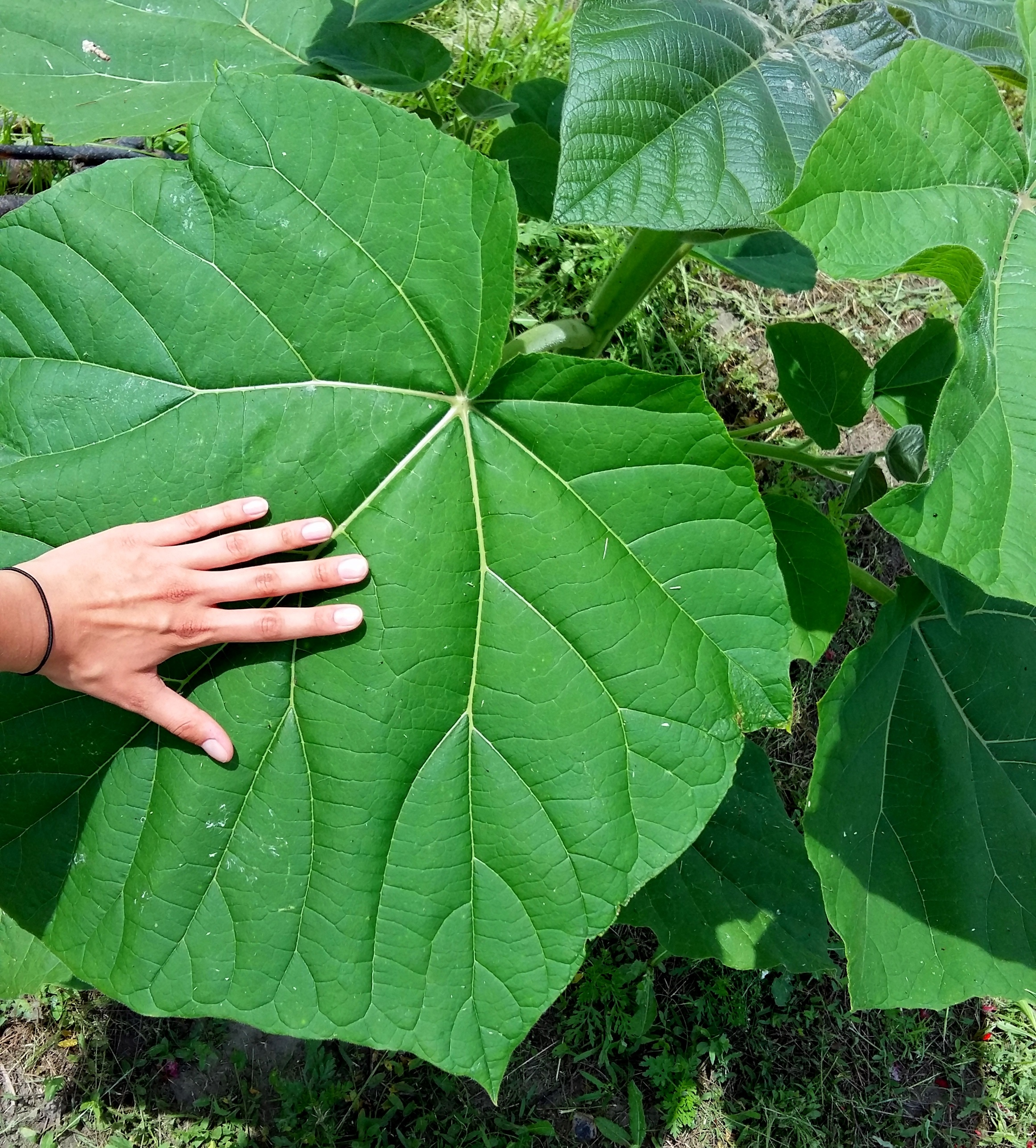 Wielki liść Oxytree